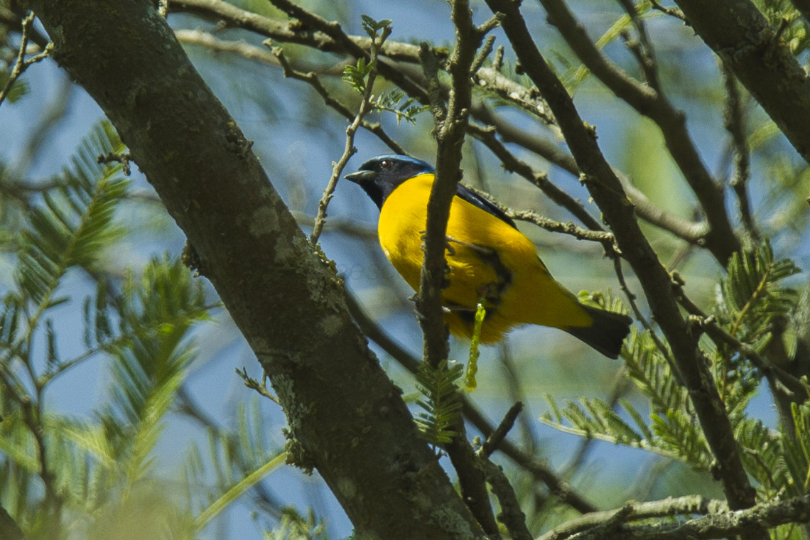 Golden-rumped Euphonia - Ecuador_S4E3340